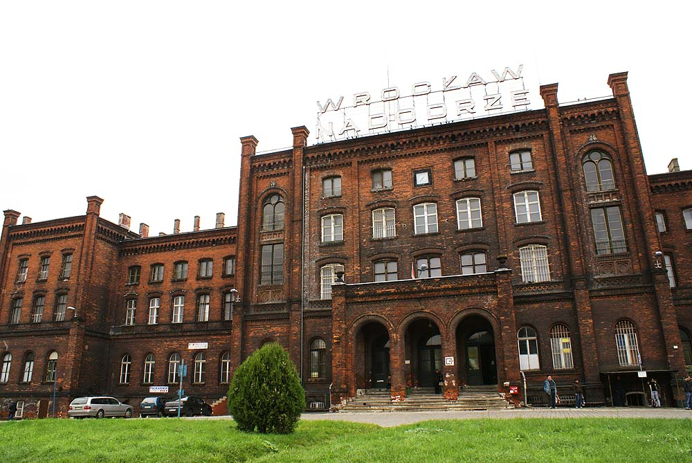 Dworzec Nadodrze pl. Staszica 50, Miasto Wrocław - Śródmieście